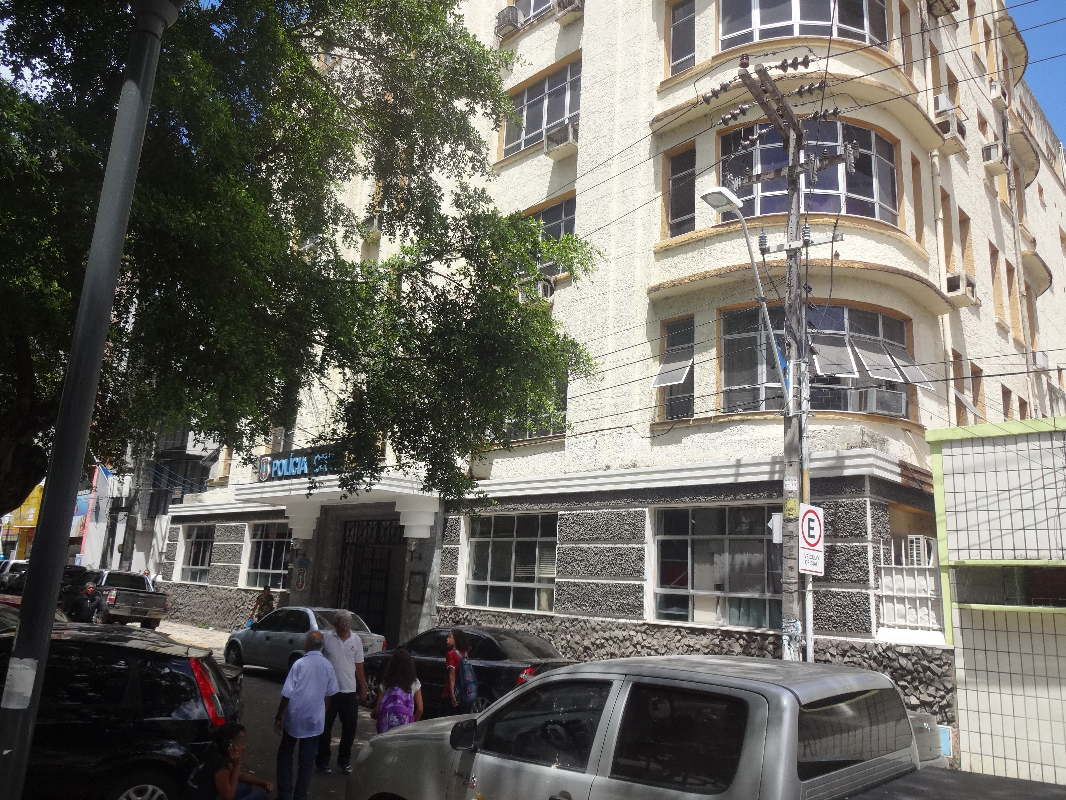 Palácio da Polícia Civil do Estado do Ceará - na cidade de Fortaleza